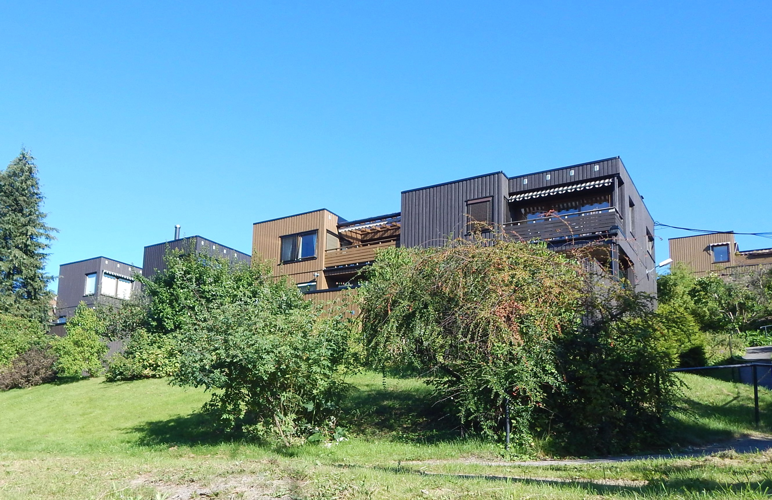 Atriumshus i borettslaget Sankthansfjellet i Larsbråtveien